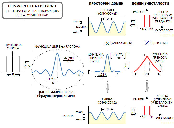 Српски (ћирилица): ФУРИЈЕОВЕ ТРАНСФОРМАЦИЈЕ НЕКОХЕРЕНТНЕ СВЕТЛОСТИ